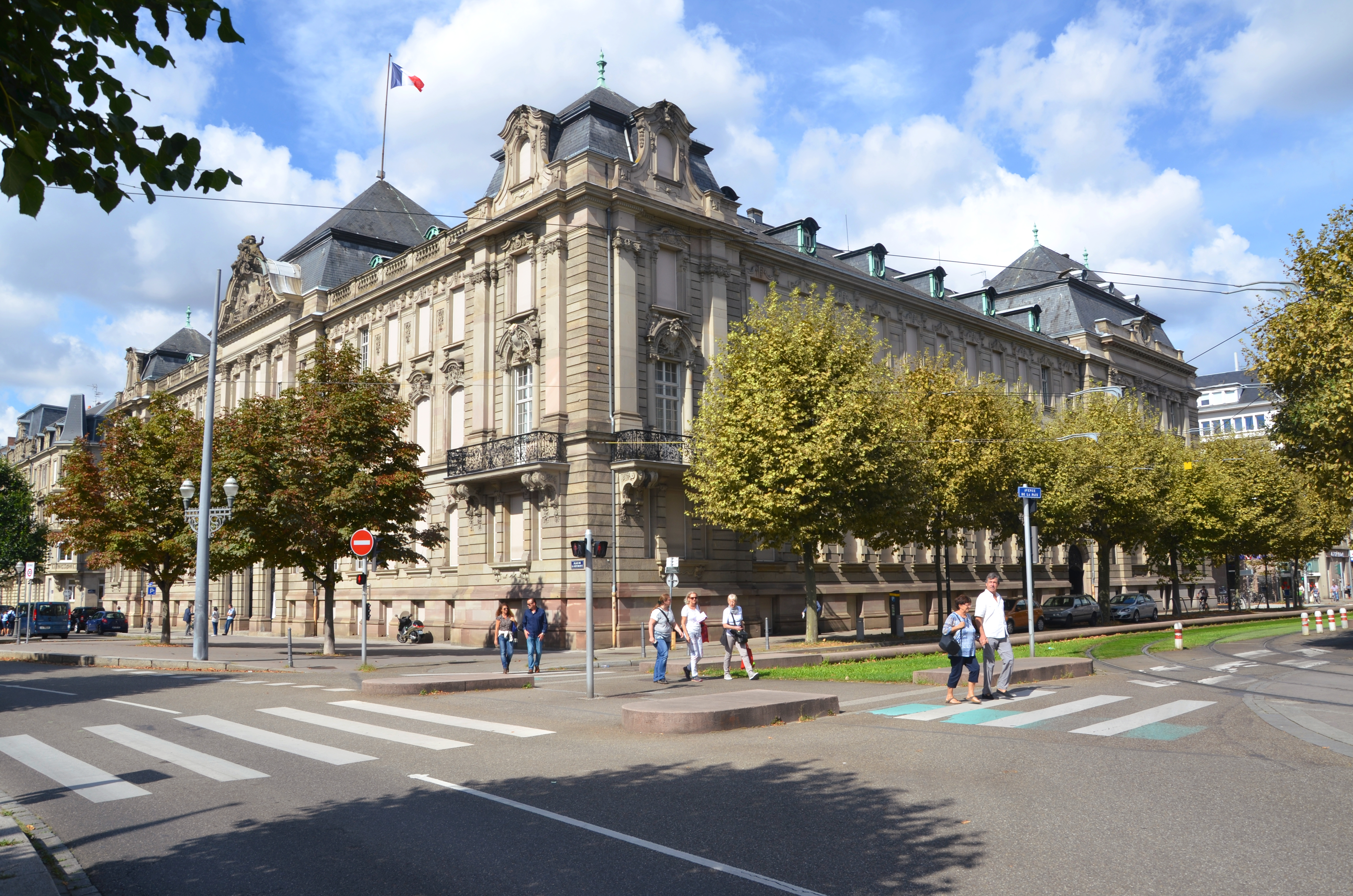 Ancien ministère ouest au temps de la Prusse, ce superbe bâtiment accueil aujourd'hui les finances publiques